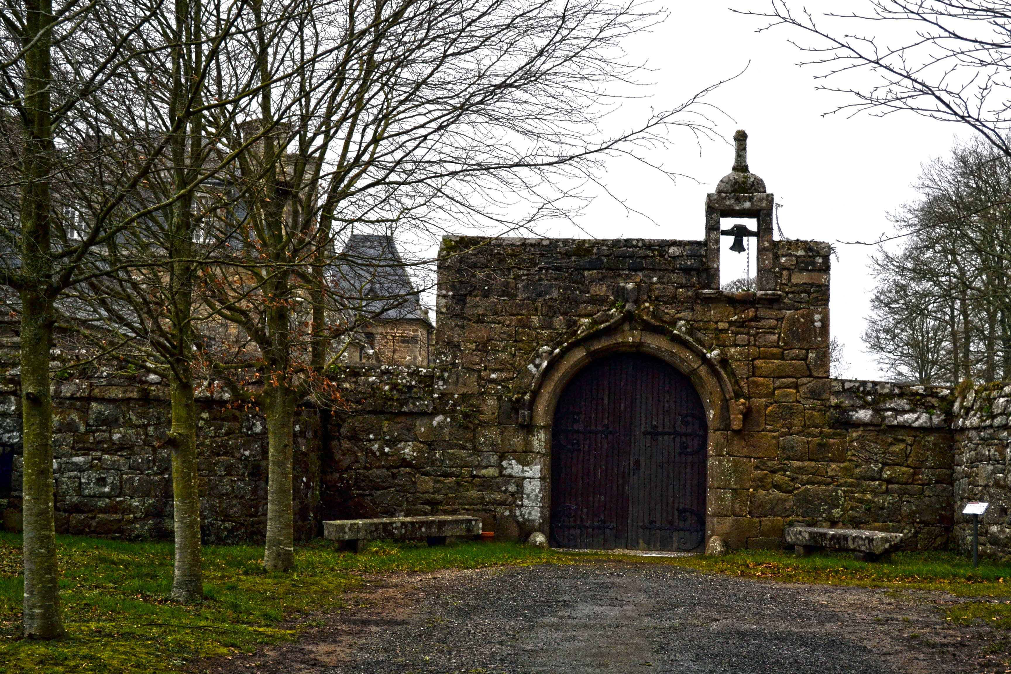 Entrée sud du château de Rosanbo à Lanvellec dans le pays du Trégor (Côtes d'Armor).